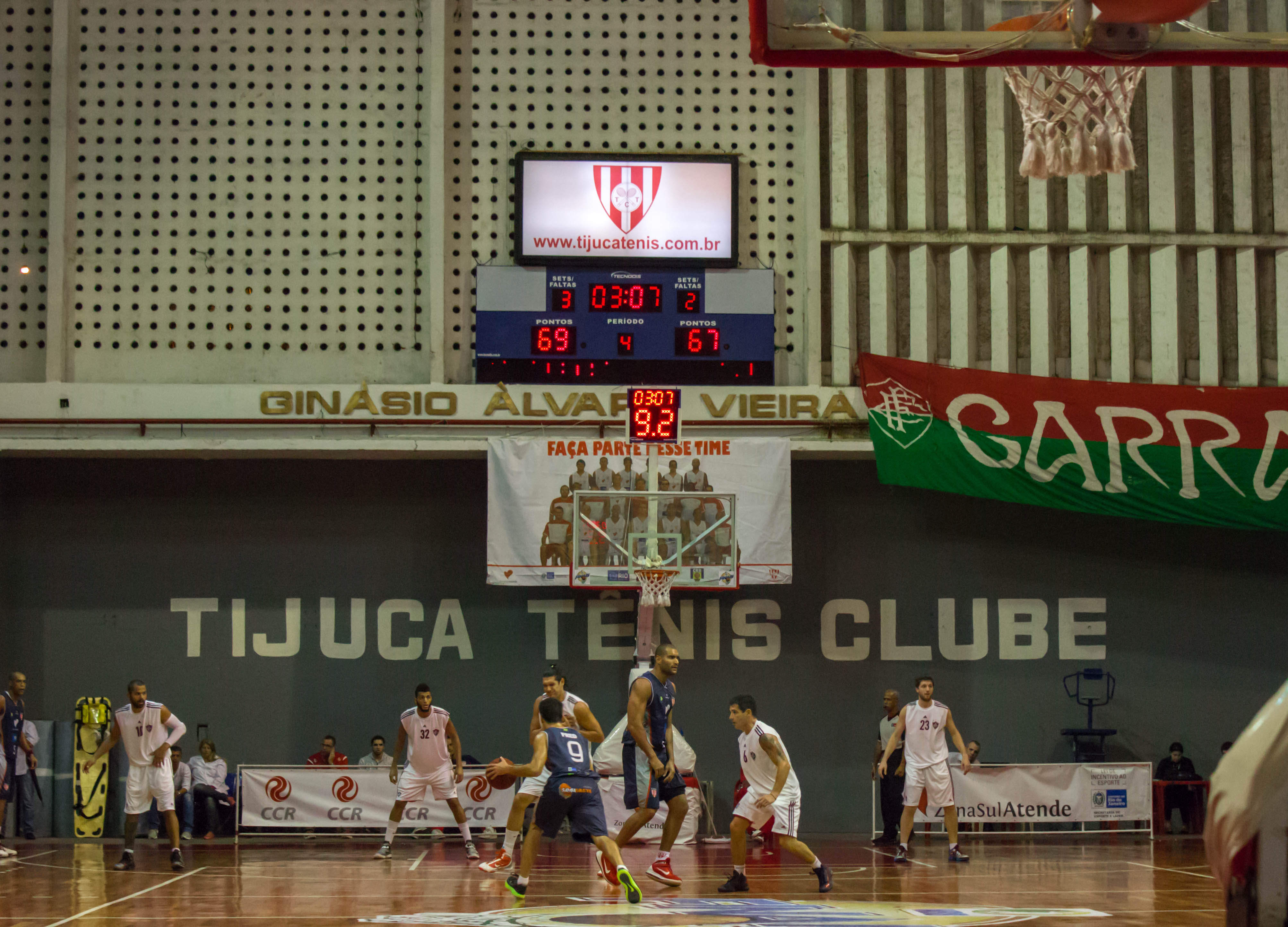 Partida Realizada entre Tijuca Tênis Clube x Fluminese, em disputa por uma vaga no NBB 13/14